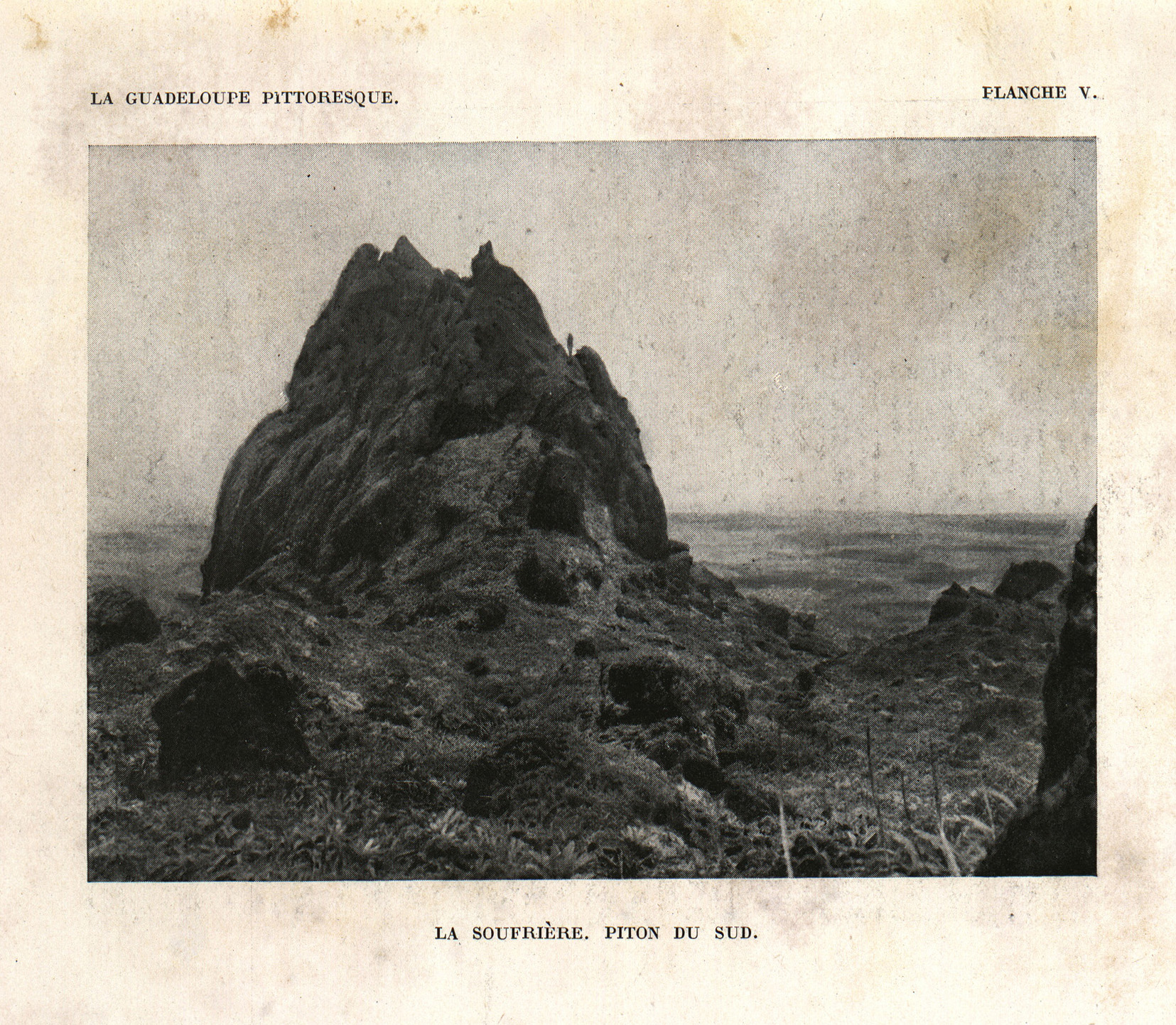 Photographie du Piton du sud de la Soufrière, Guadeloupe, au début du 20e siècle